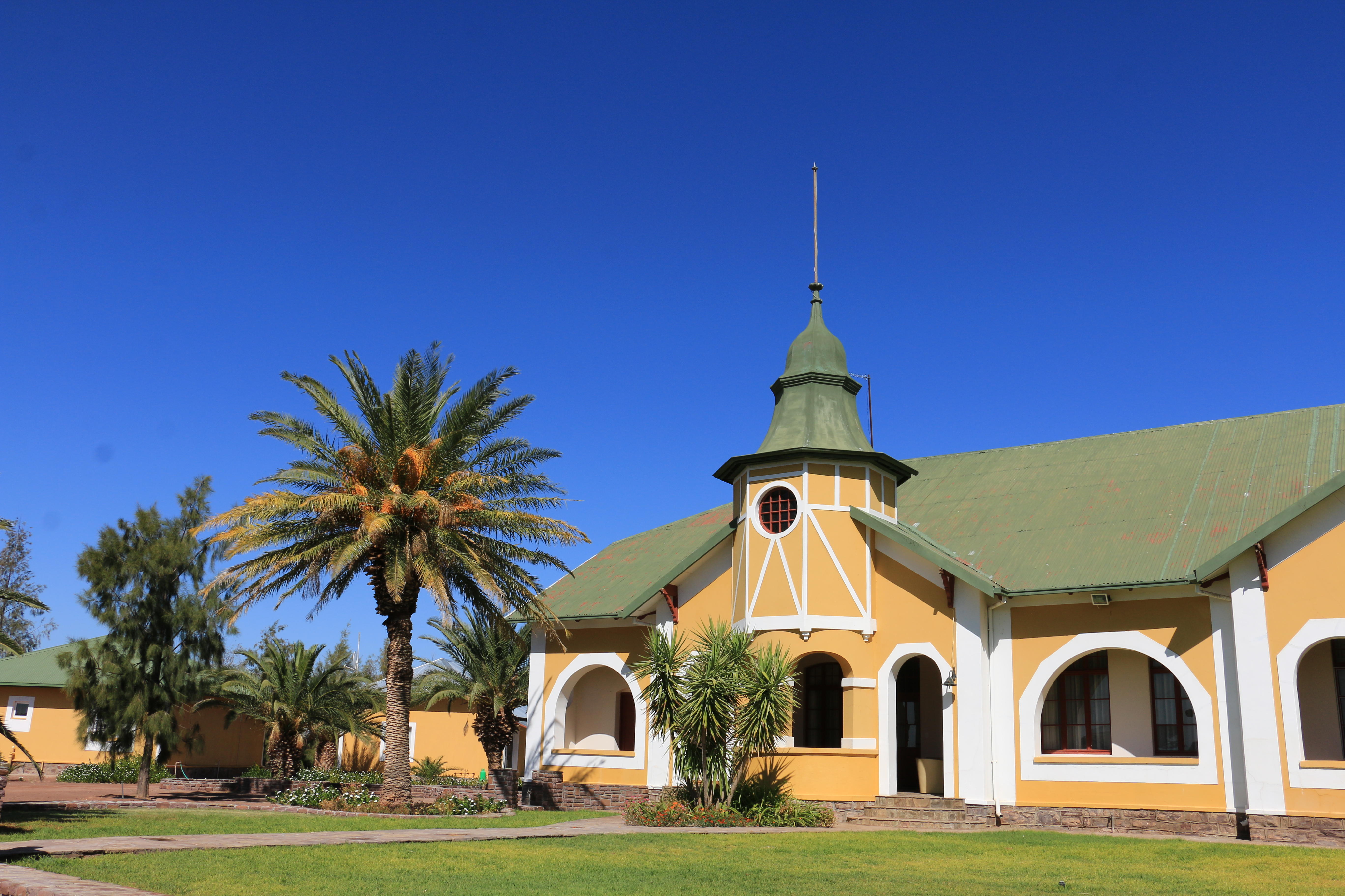 Jagdfarm Gras (2016)